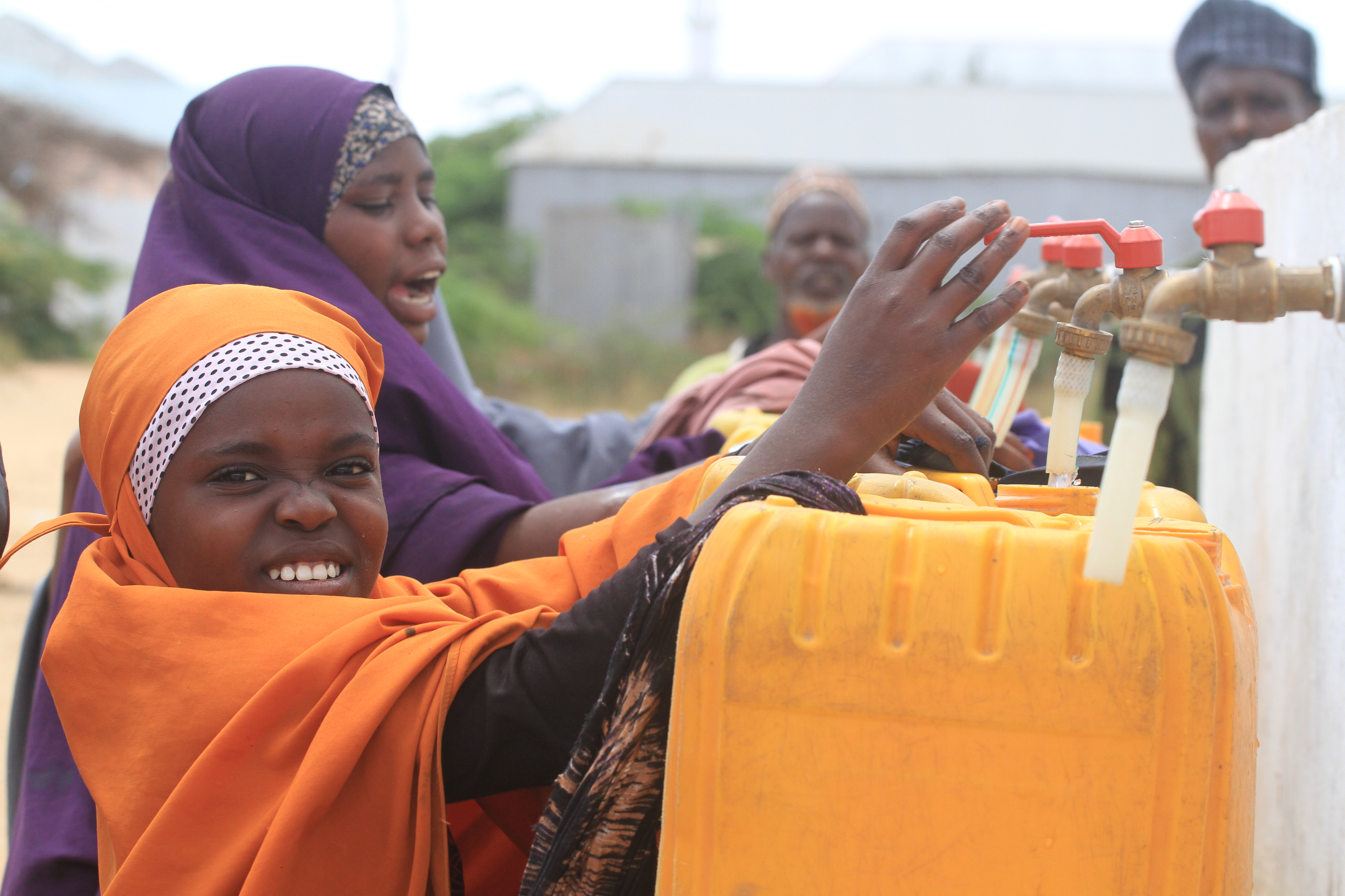 W Somalii PAH buduje ujęcia wodne.